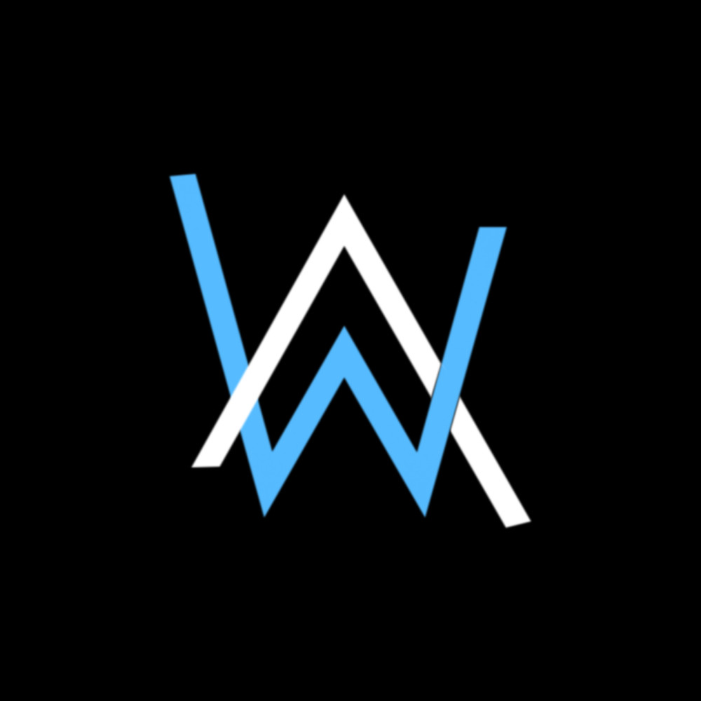 Логотип Алана